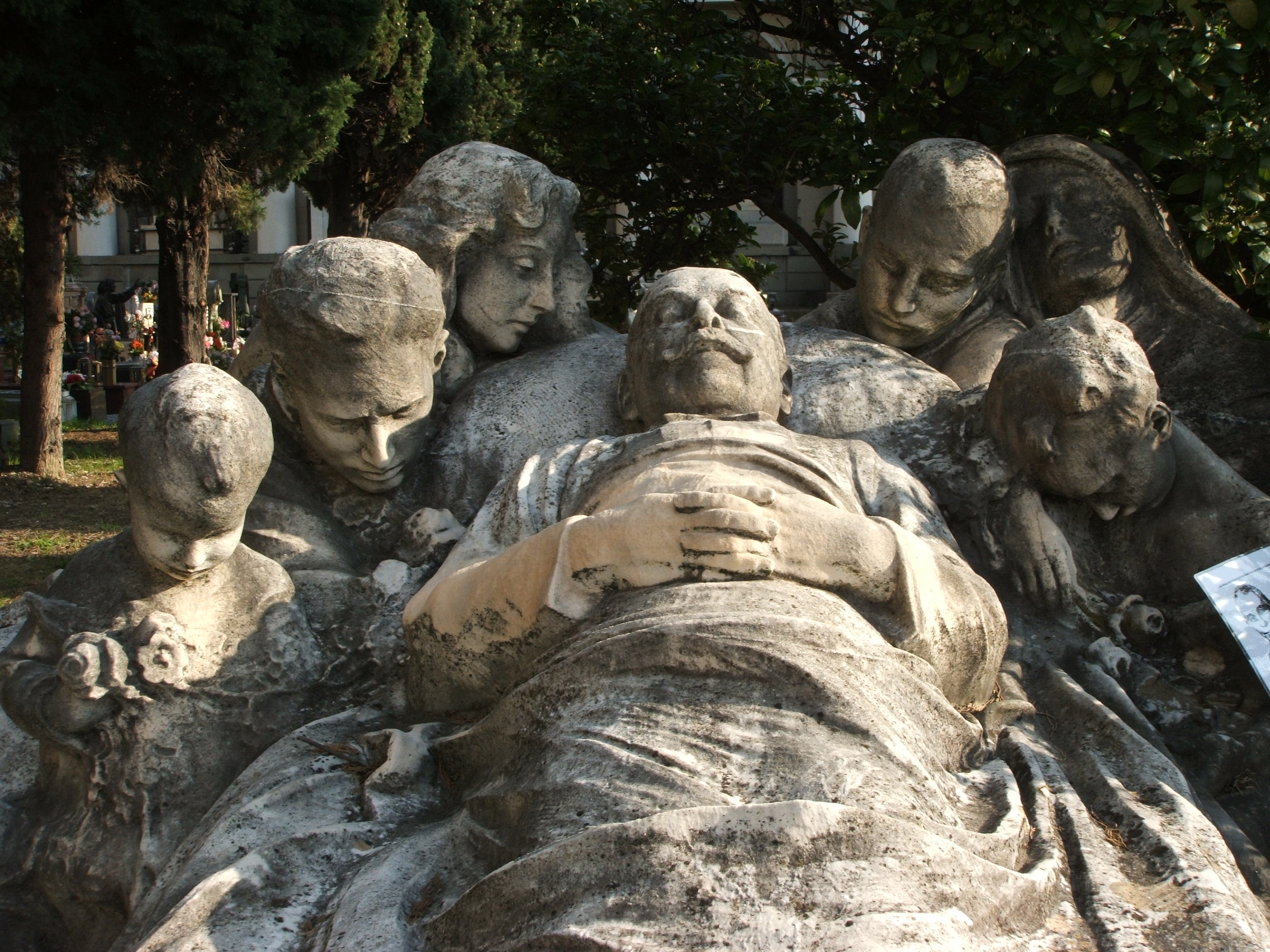 Tomba Lavarello Anselmi, Cimitero monumentale di Staglieno, Genova